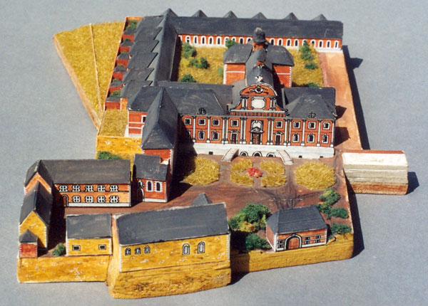 La Chartreuse des Saints-Apôtres (Liège /Belgique) : maquette du monastère réalisée par Jean Kelecom et Jean-Marie Schmitz. L'église a été démolie en 1799. La ferme des Chartreux, située à doite de l'église, manque sur cette maquette.